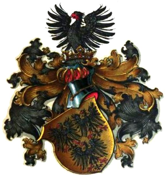 Das Wappen der Linie des Gottfried von Enckevort aus dem Jahre 1530 Datum: 1530 Urheber: unbekannter Herardiker Quelle: Link zum Bild